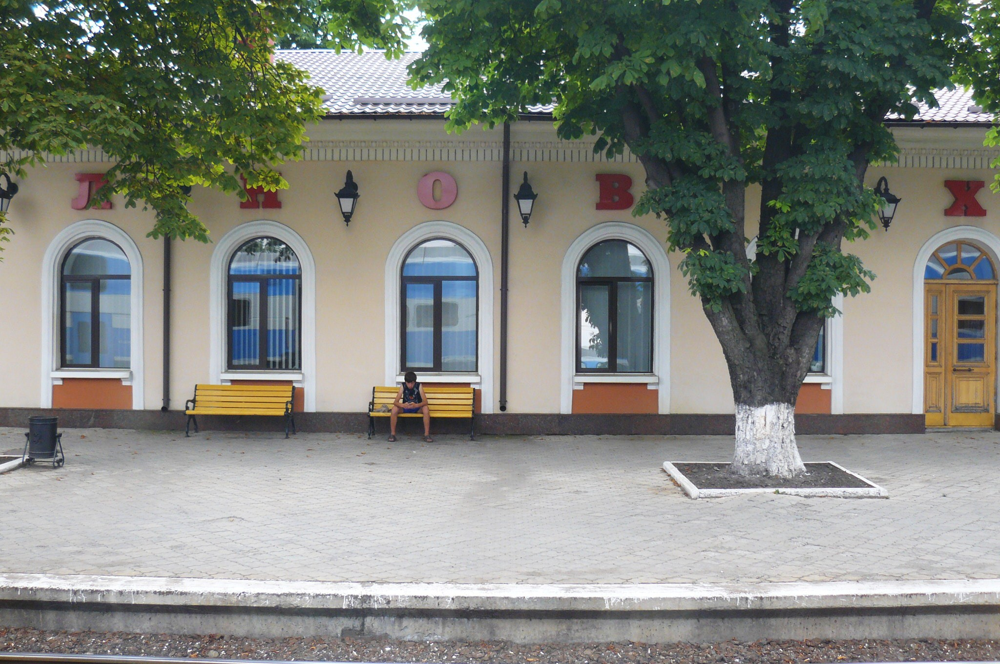 Volnovaha.